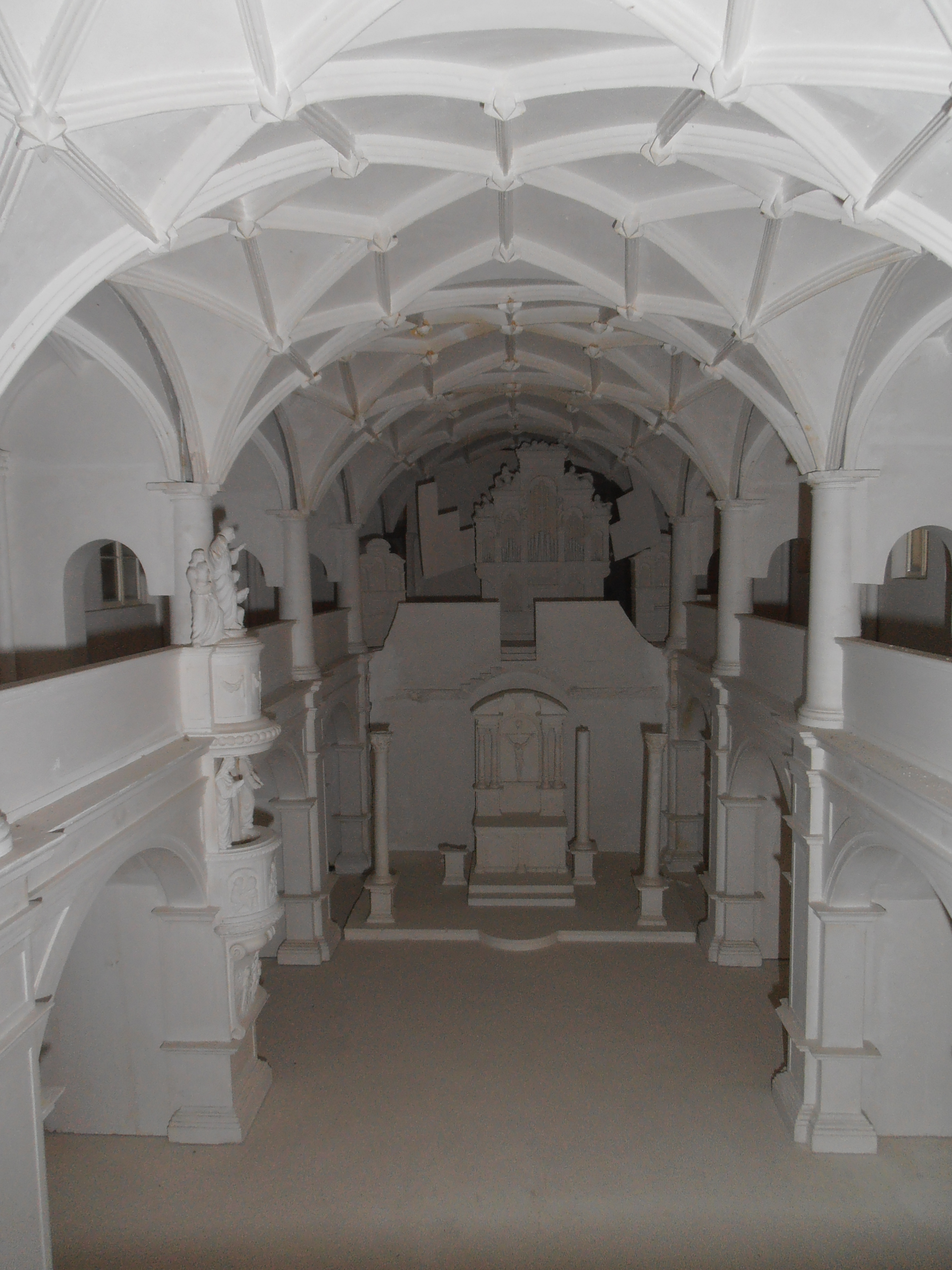 Gipsmodell der Schlosskapelle Dresden aus DDR-Zeiten, Blick von Westen in den Kirchenraum